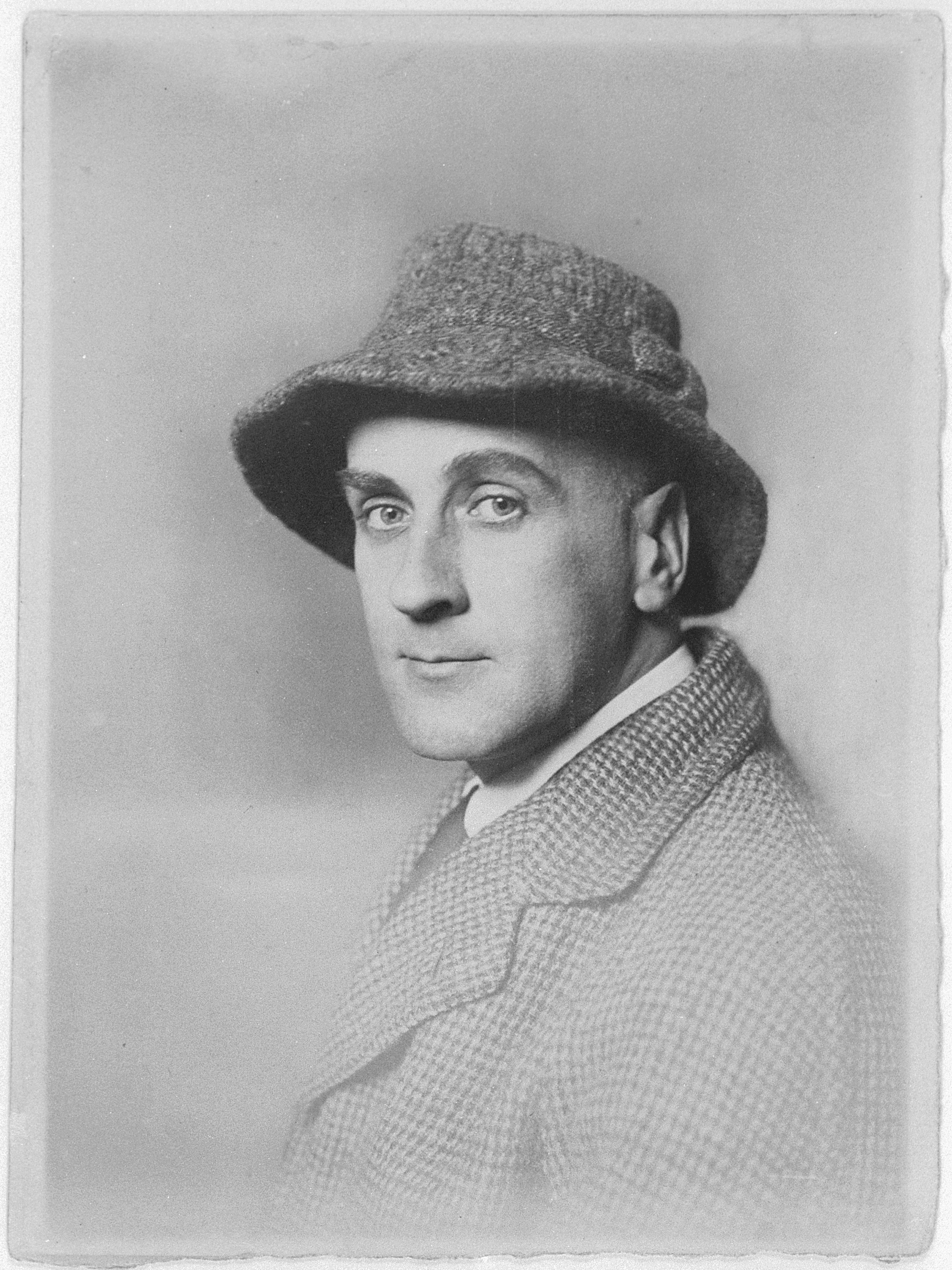 Wilhelm Uhde, portrait photograph